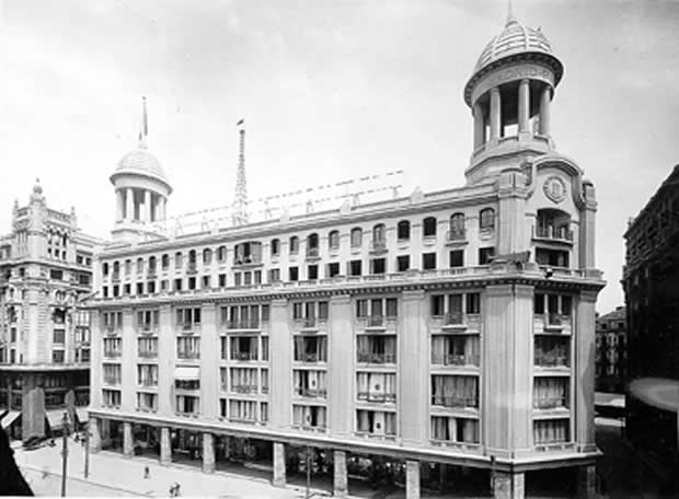 Edificio Almacenes Madrid-París a principios de los años 30